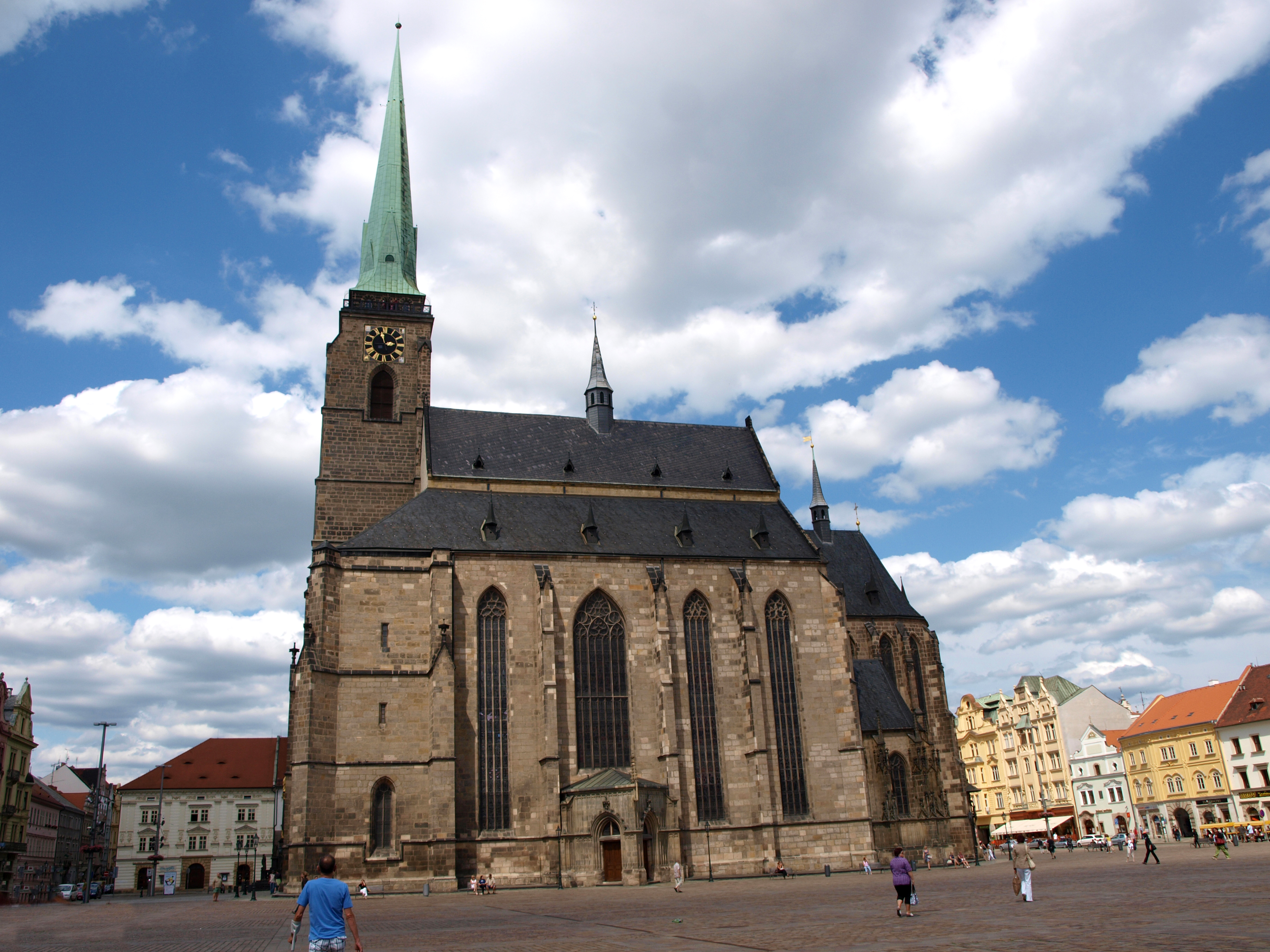 Kostel sv. Bartoloměje náměstí Republiky, Plzeň Číslo rejstříku ÚSKP: 31318/4-176